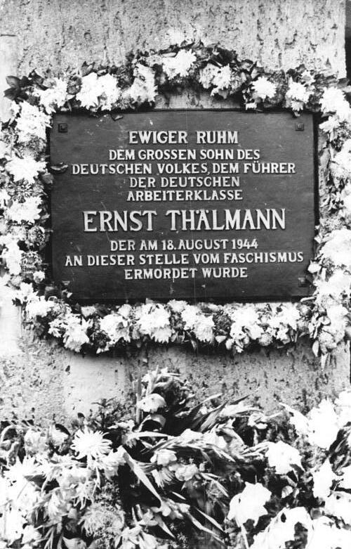 Gedenkstätte Buchenwald, Krematorium, Thälmann-Gedenktafel Zentralbild TBD-Kister Str-Ho 19.8.1953 Thälmann-Gedenktafel in Buchenwald enthüllt Am 18.8.1953, dem 9.Jahrestag der Ermordung des deutschen Arbeiterführers Ernst Thälmann, wurde an der Mordstelle am Krematorium des ehemaligen Konzentrationslagers Buchenwald eine Gedenktafel enthüllt. UBz: Die Gedenktafel im Hofe des Krematoriums des ehemaligen Konzentrationslagers Buchenwald.